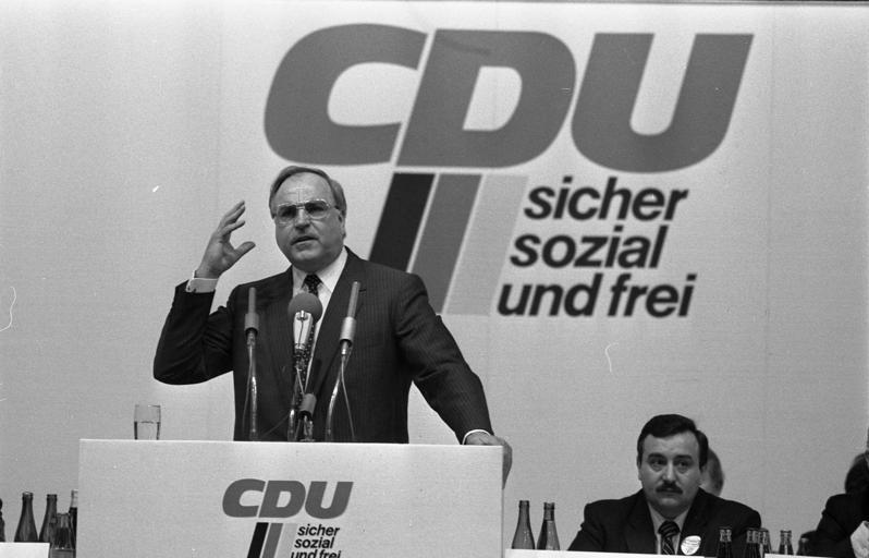 08.01.1983 CDU-Wahlkundgebung zur vorgezogenen Bundestagswahl am 06.03.1983 mit Bundeskanzler Dr. Helmut Kohl in Ludwigshafen.